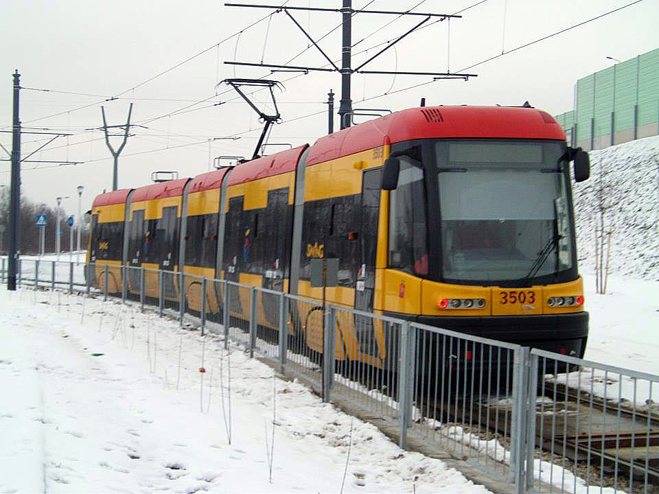 Tramwaj Pesa 120Na Duo (Swing Duo) na przystanku Stare Świdry